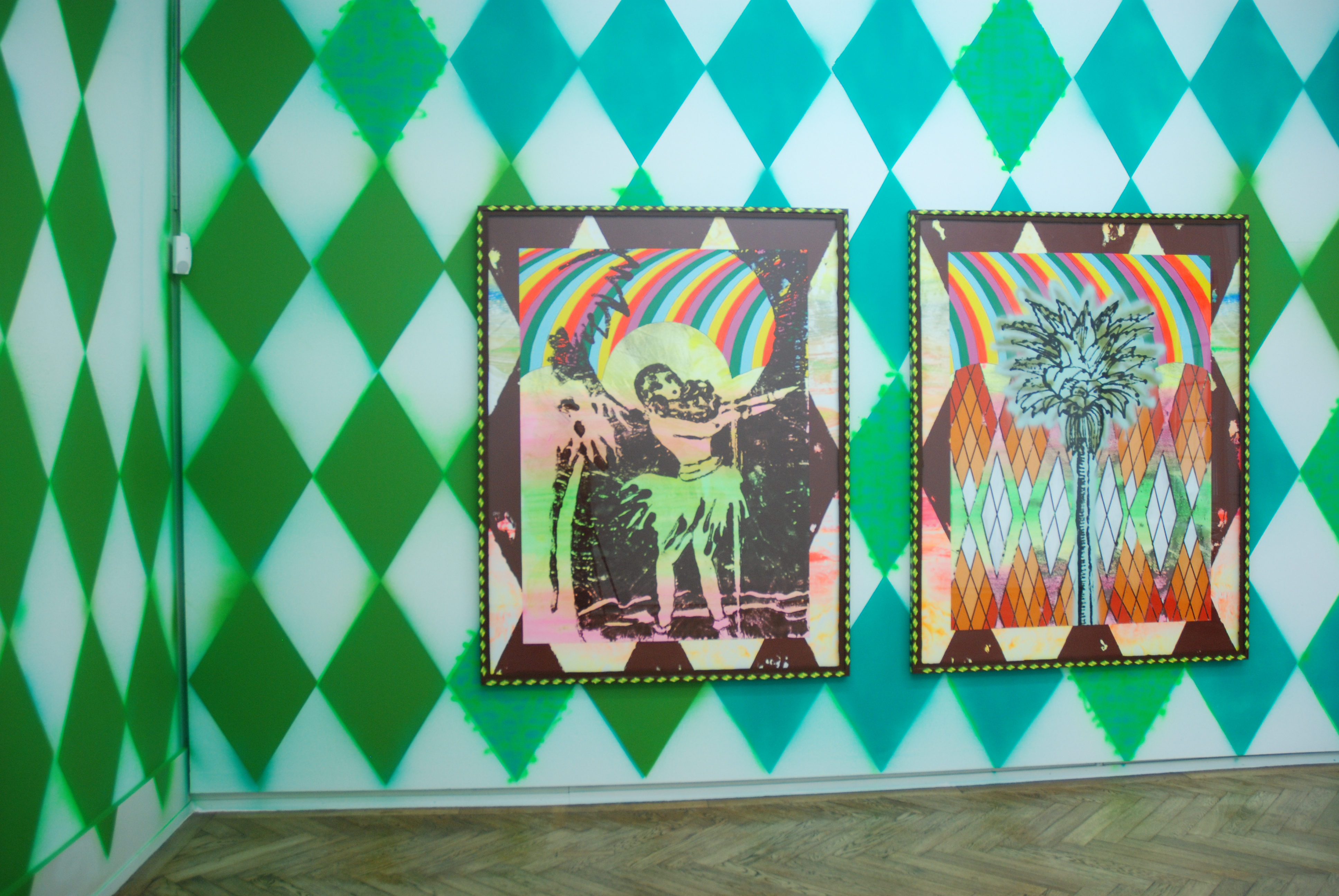 Innenansicht Kunsthaus Langenthal, Installation „Vom Biegen, vom Brechen“ von Christine Streuli, 2007, heute im Besitz der Künstlerin